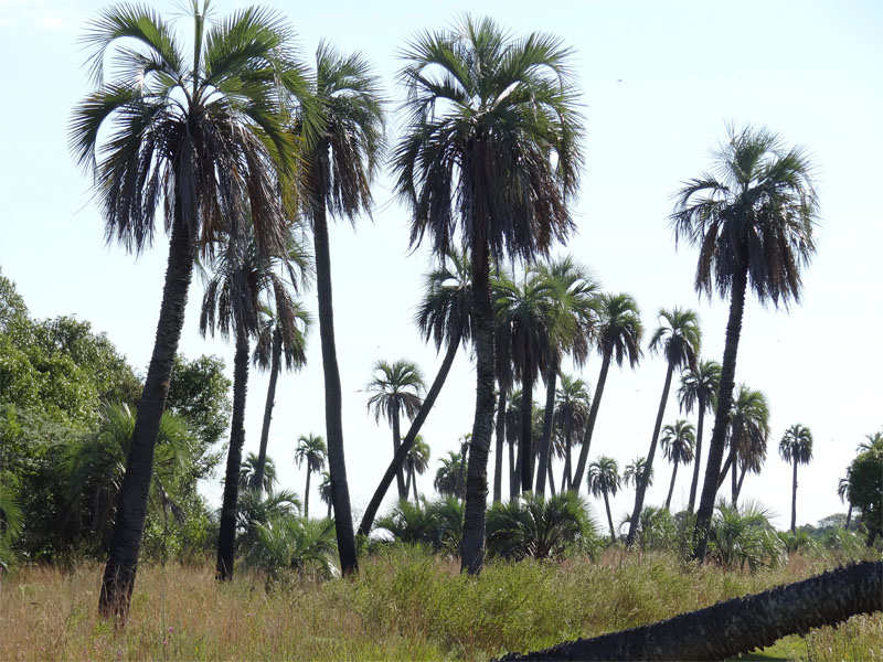 Palmar de Yatay dentro dentro del Parque Nacional Mburucuyá